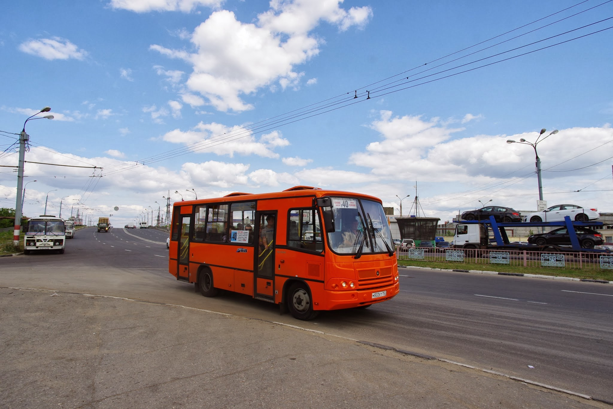 Avtozavodsky City District, Nizhny Novgorod, Nizhny Novgorod Oblast, Russia